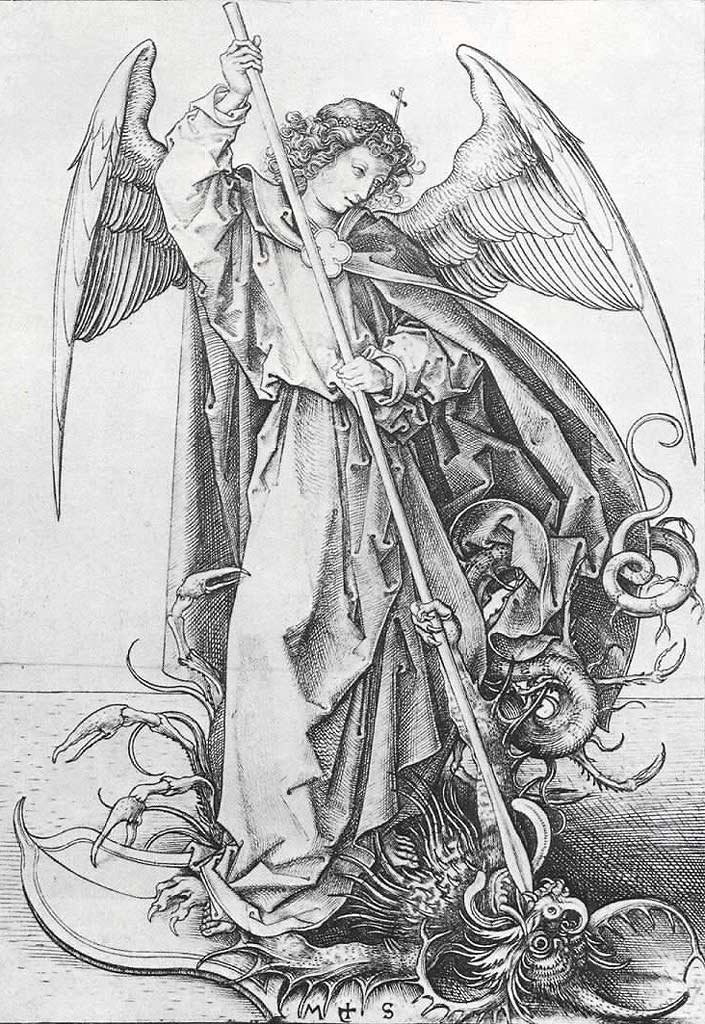 著作権切れという解釈で載せていますが、問題がある場合は遠慮なく削除してください。